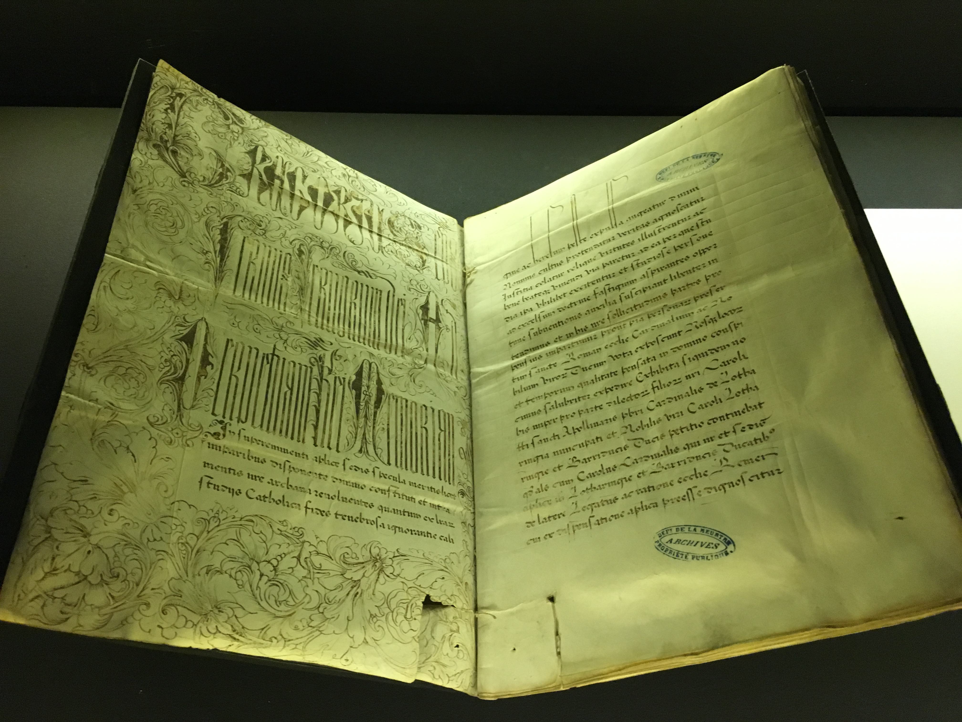 1572 bulla in supereminenti